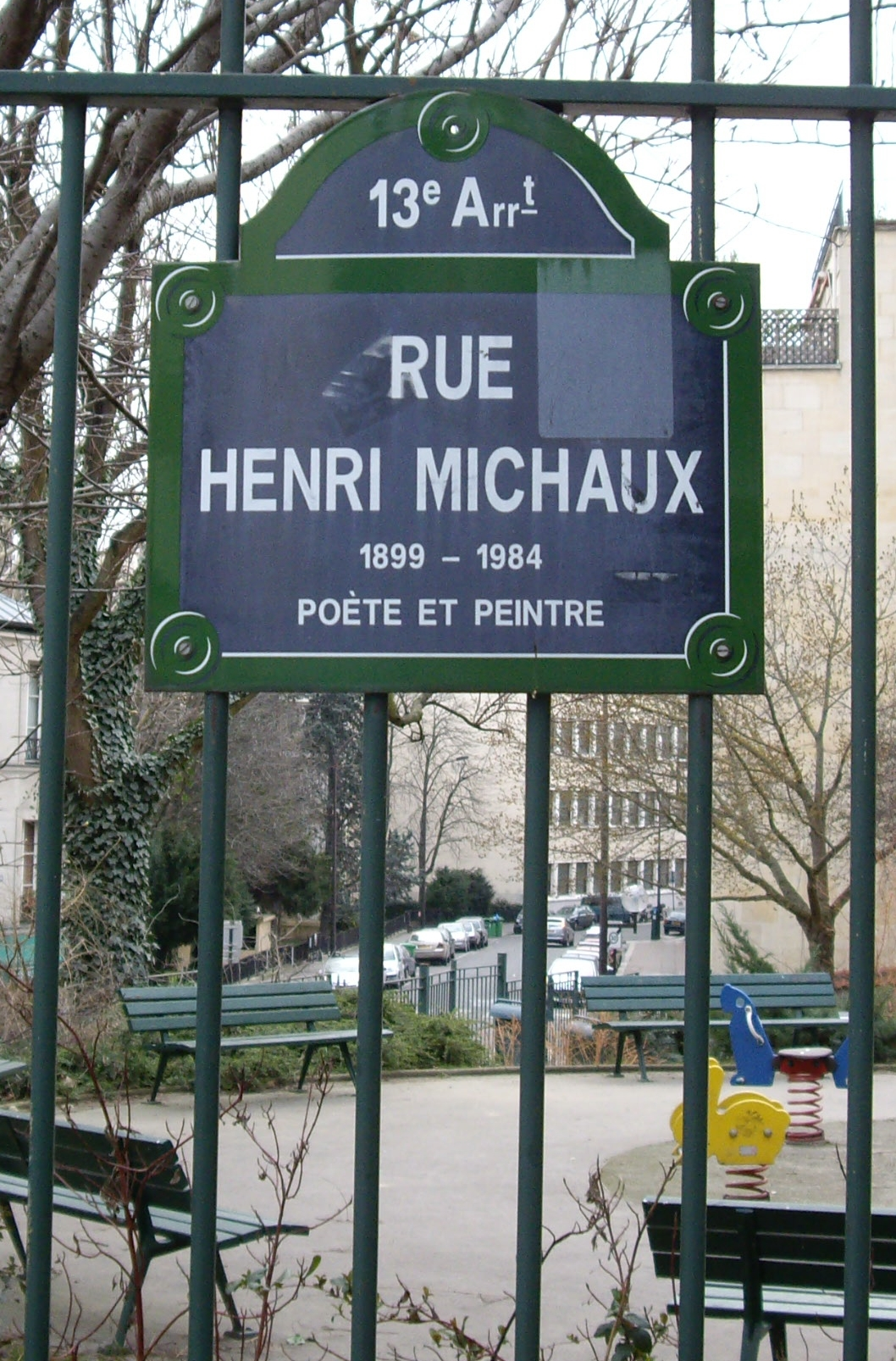 Plaque de la rue Henri-Michaux, Paris 13e, en mémoire du poète et peintre français d'origine belge Henri Michaux (1889-1984).